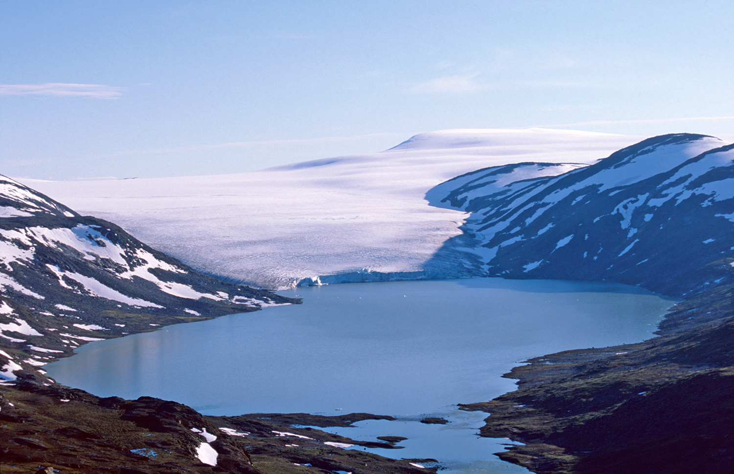 Leirvatnet med Blåmannsisen i bakgrunden. Vy från toppen 1204.